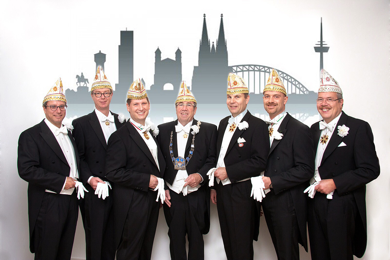 Vorstand 2016 v.l. Präsident Theo Schäfges - 1.Vorsitzender Ingo Pohlkötter - Geschäftsführer Peter Esser - Schatzmeister Reinhard Müller - Literat Dirk Finkernagel - Ratspräsident Markus Stoffel - Senatspräsident Bruno Grimbach